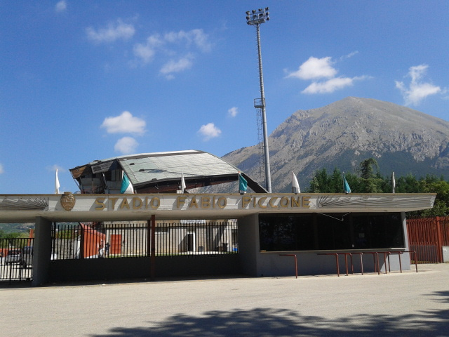 Ingresso dello stadio Fabio Piccone di Celano